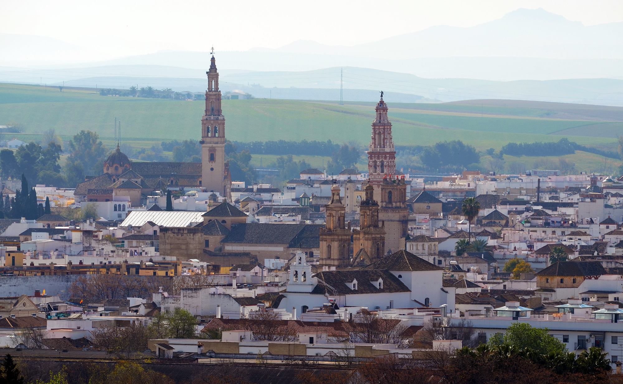 Iglesia de San Gil